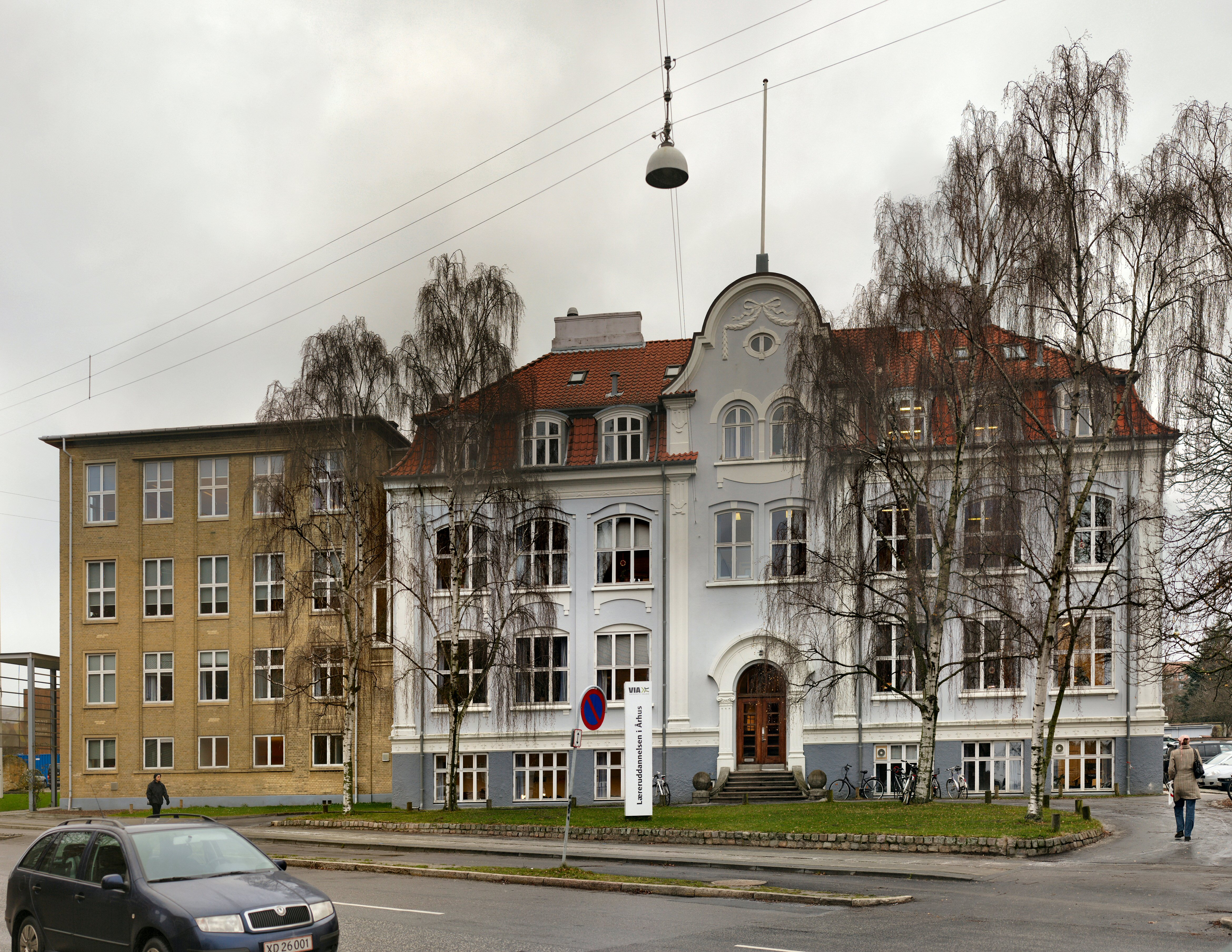 Læreruddanelsen i Århus (Århus Dag- og Aftenseminarium)